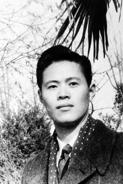 许崇德